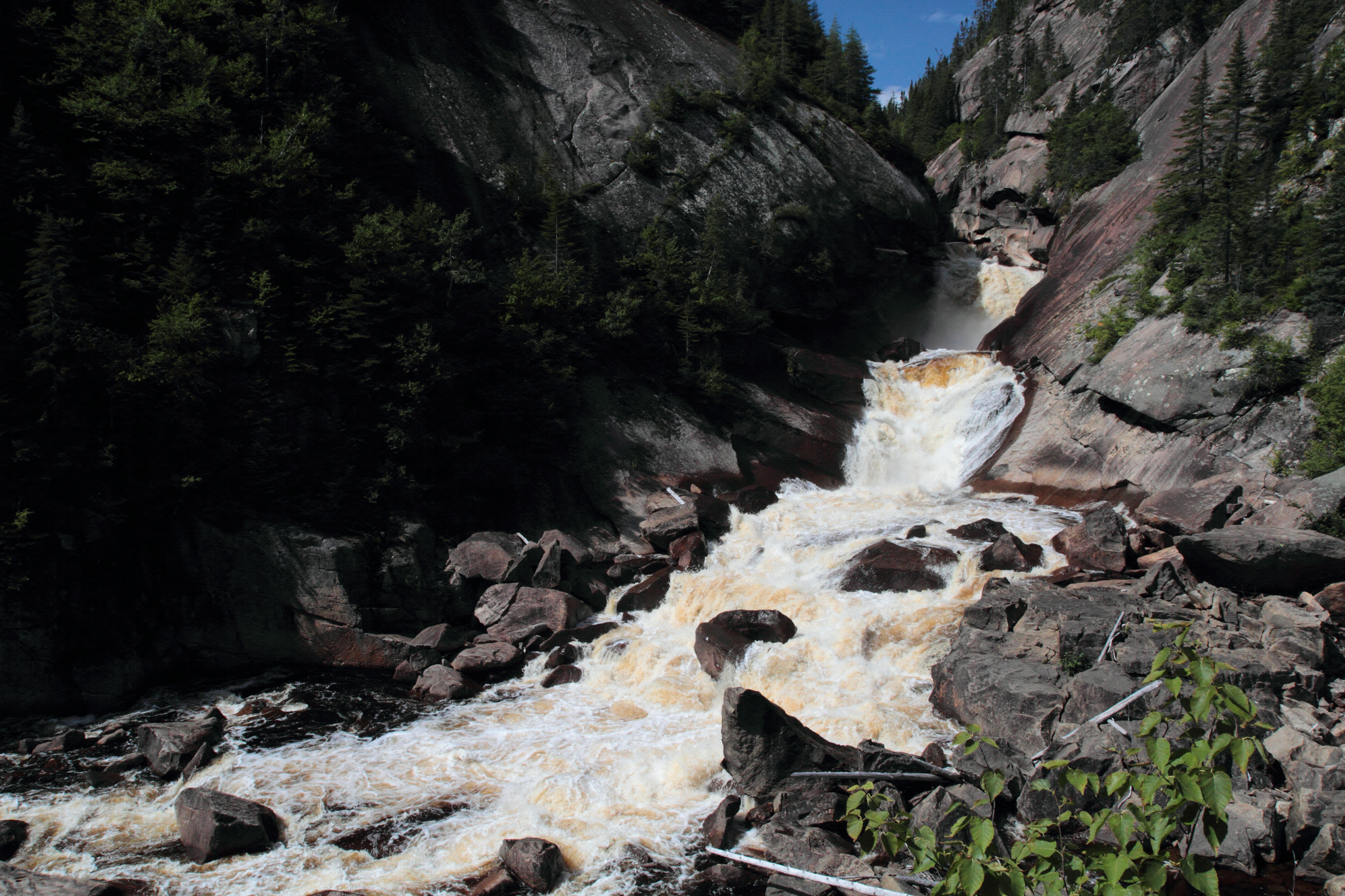 Chute MacDonald sur la rivière MacDonald, Réserve Faunique Port-Cartier-Sept-Îles, Québec, Canada